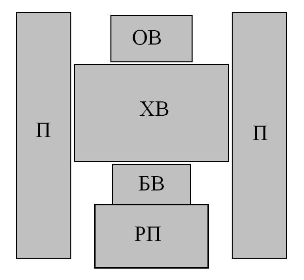 Template:Картинка инфо Хамбургски проспект: ХВ – хауптверк, РП – рюкпозитив, БВ – брустверк, ОВ – оберверк, П – педали.